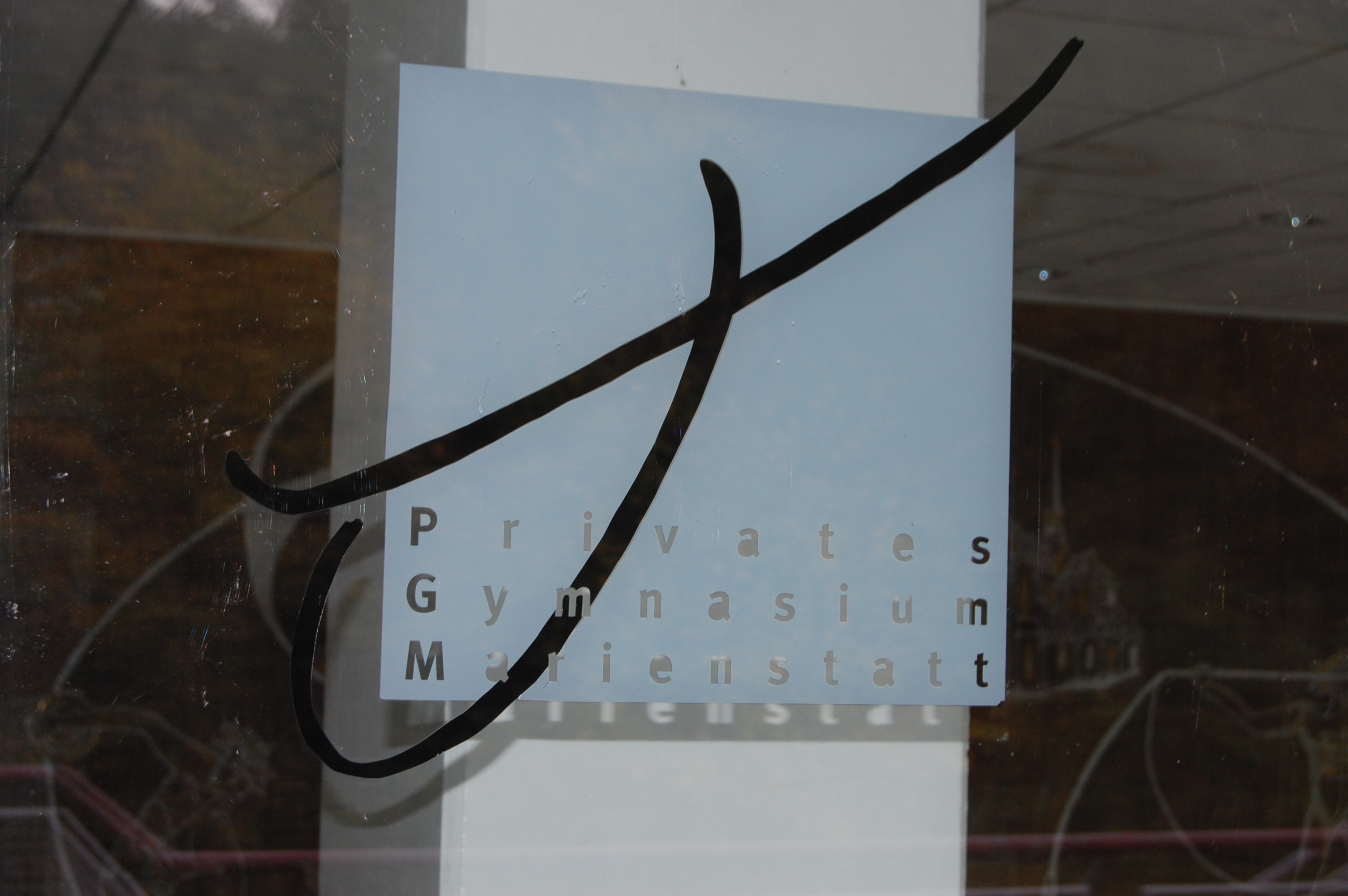 Logo des Gymnasiums Marienstatt, das an allen wichtigen Punkten der Schule angebracht ist.